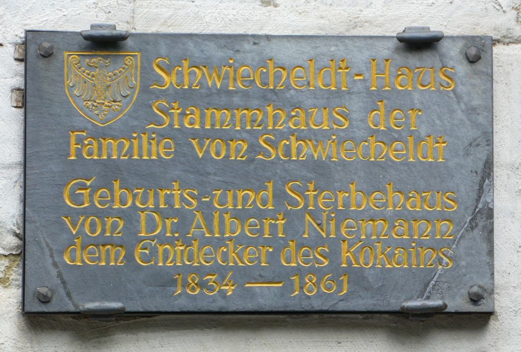 Gedenktafel für Albert Niemann an seinem Geburts- und Sterbehaus in Goslar